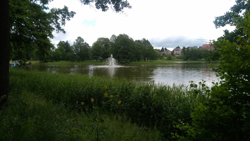 Zdj Alei Filozofów